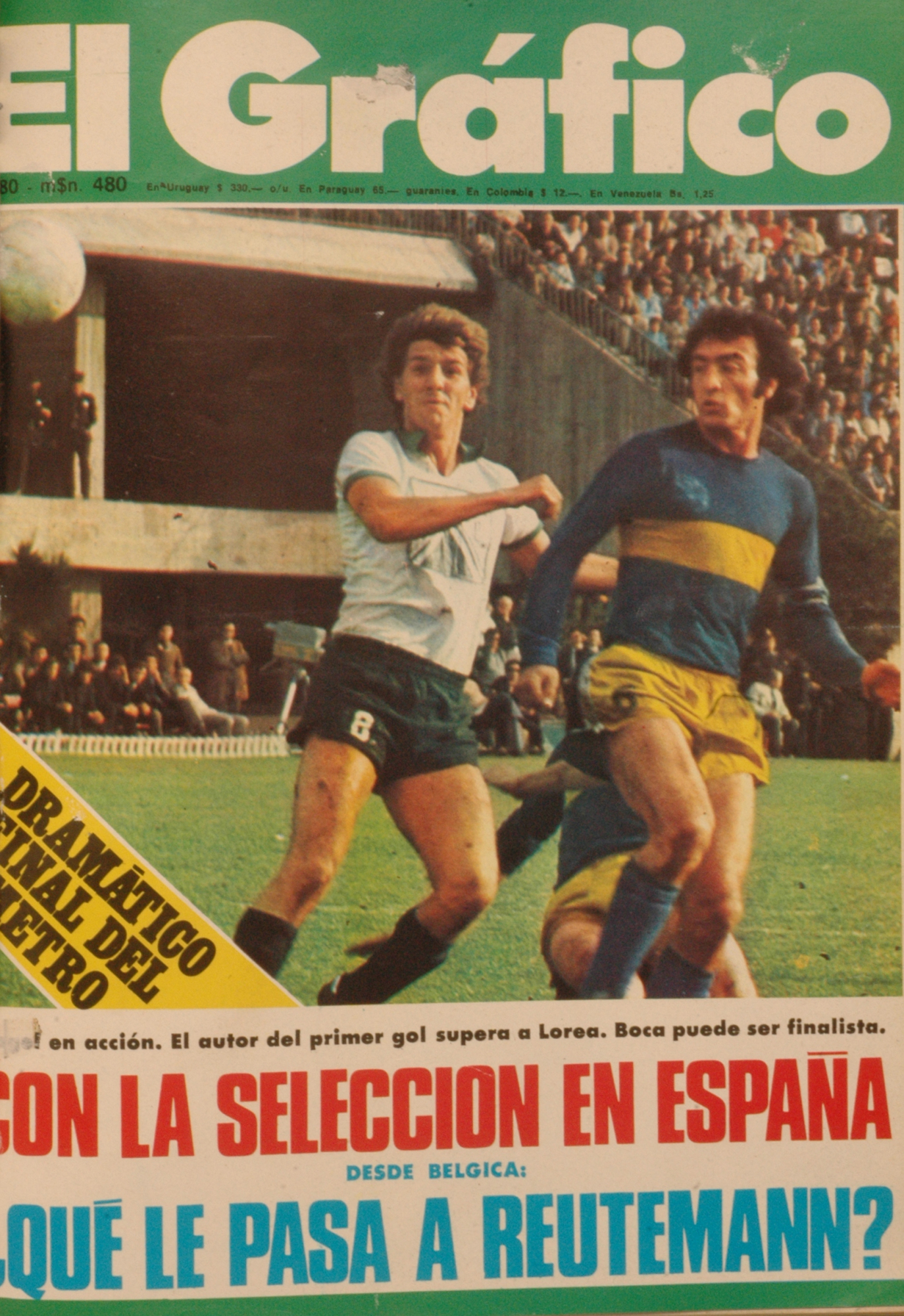 El Grafico del 14 de Mayo de 1974. Edicion 2849